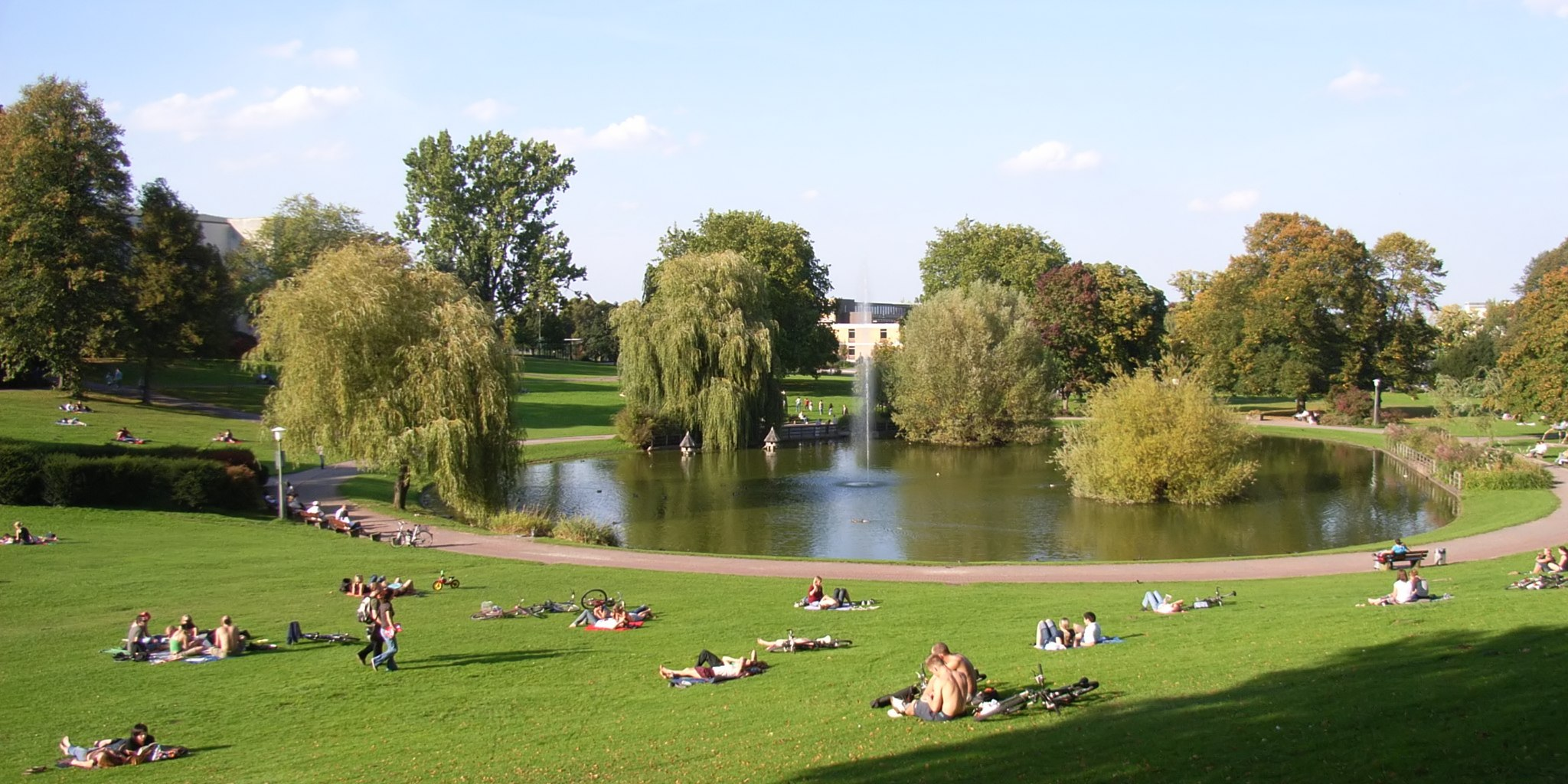 Bielefeld, Deutschland: Bürgerpark.